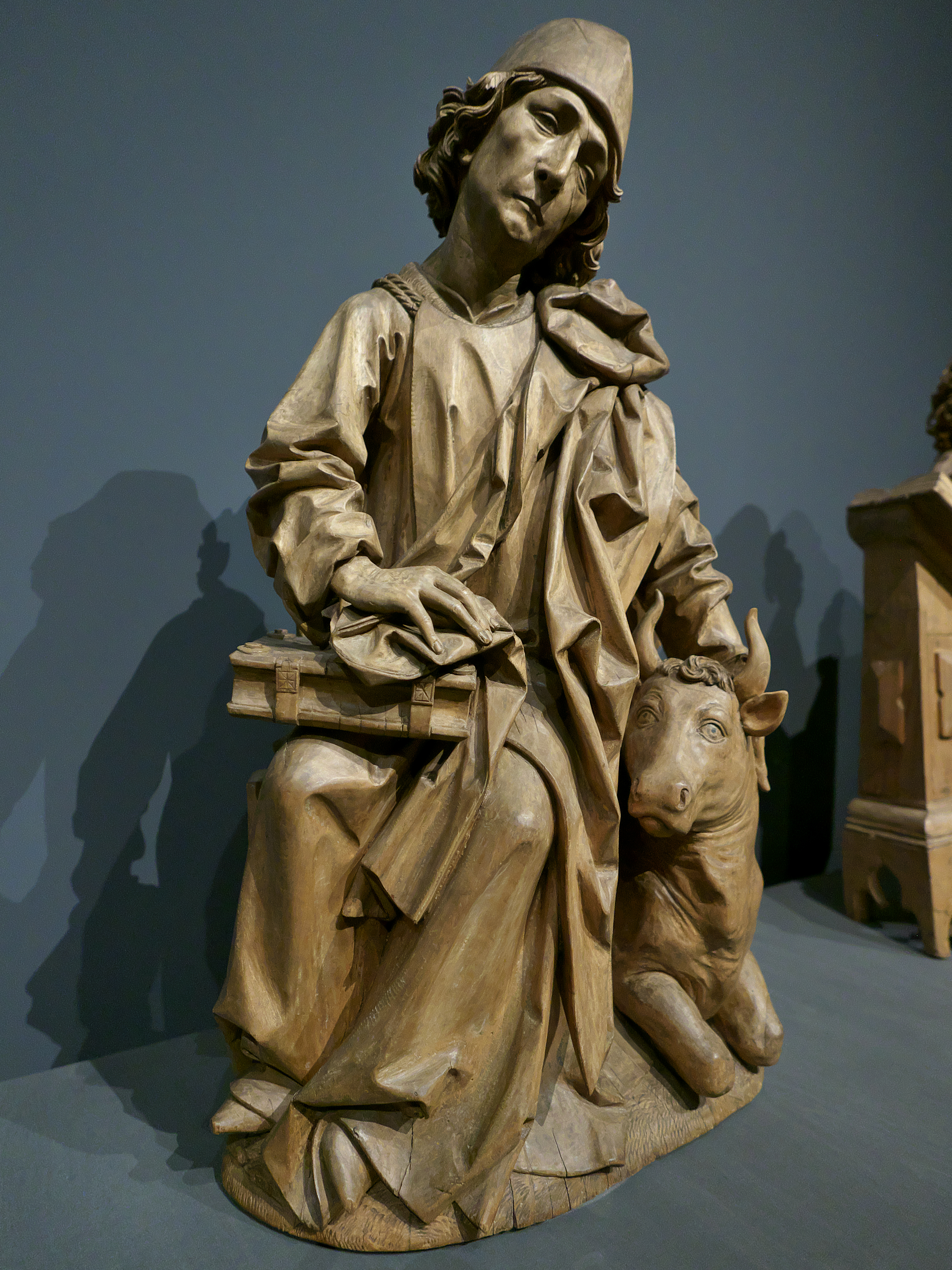 Últimos fuegos góticos, Palacio de Villena (Valladolid). Banco del retablo mayor de la Iglesia de Santa María Magdalena (Münnerstadt). Tilman Riemenschneider (h. 1490)